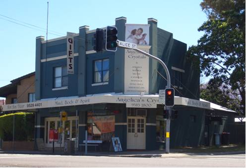 Sans Souci